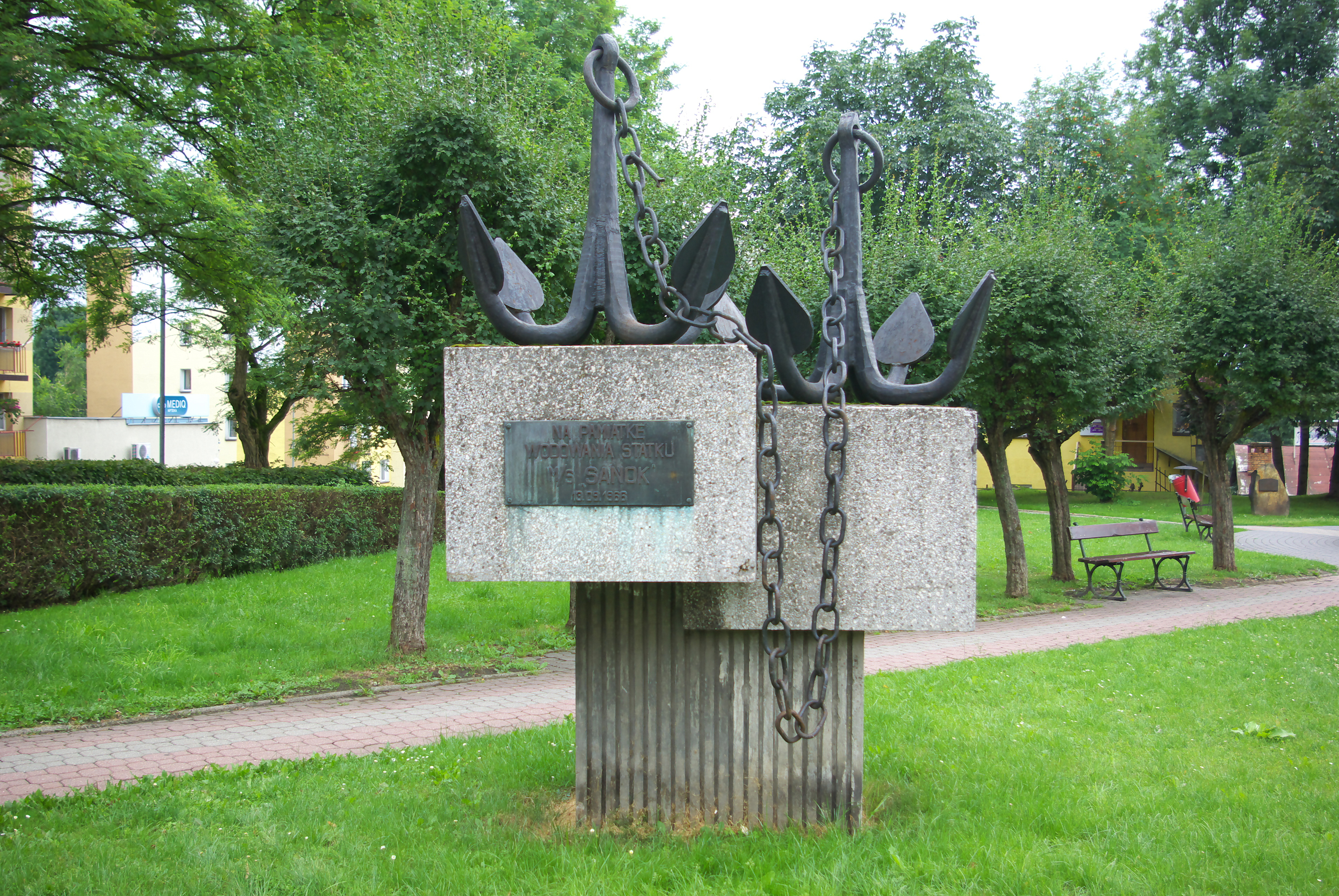 Pomnik upamiętniający wodowanie statku morskiego pod nazwą "Sanok", które miało miejsce 13 maja 1966 roku